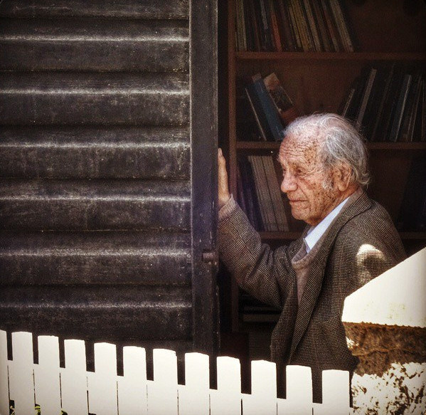 Me pilló sacándole la foto y me echó la media espantá.